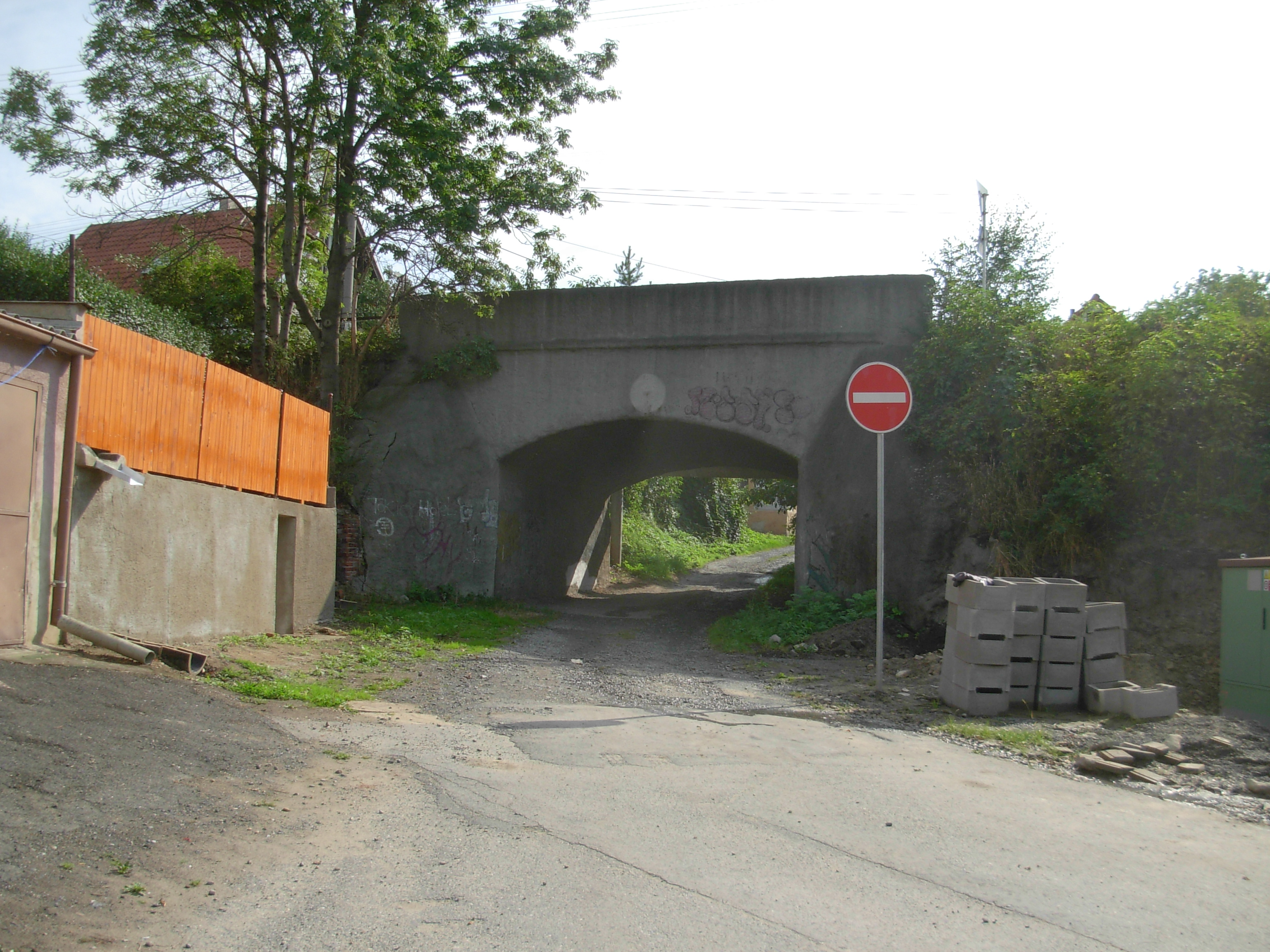 Další pohled z opačné strany na kterém jsou dobře patrny neodstraněné náletov dřeviny.